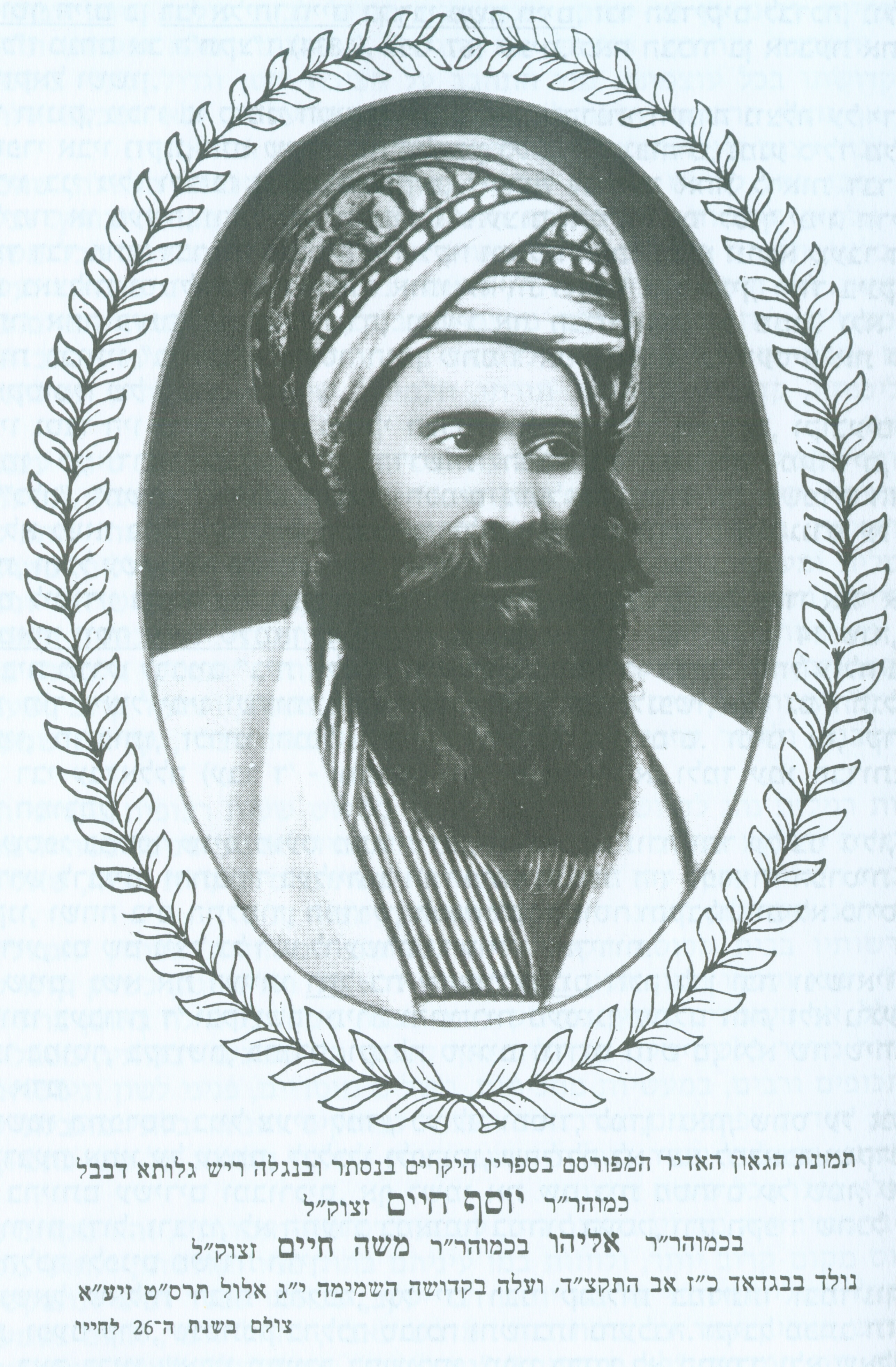 איור של רבי יוסף חיים מבגדאד, "בן איש חי", המבוסס על תצלום מגיל 26